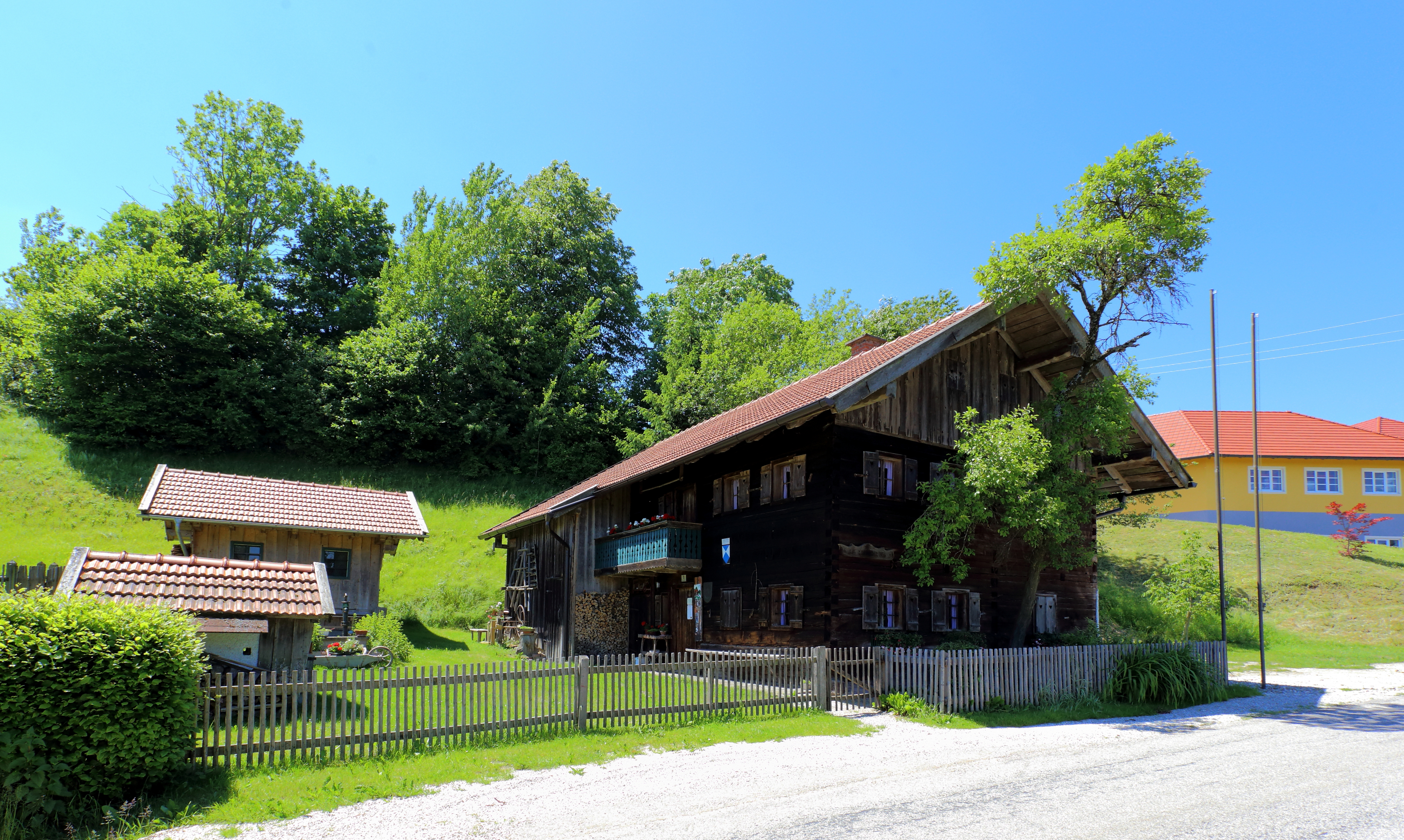 Das Heimatmuseum, Beandhaus bzw. Pointhaus bezeichnet, der oberösterreichischen Gemeinde St. Johann am Walde. 1987 erwarb die Gemeinde diese Sölde und errichtet darin ein Heimatmuseum.